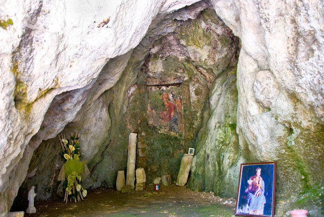 Santuario di Maria Santissima del Monte Taburno a Bucciano (BN): la grotta della Madonna con resti di un affresco medievale.